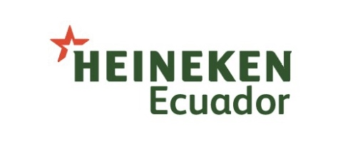 Logo de la compañía cervecera HEINEKEN Ecuador